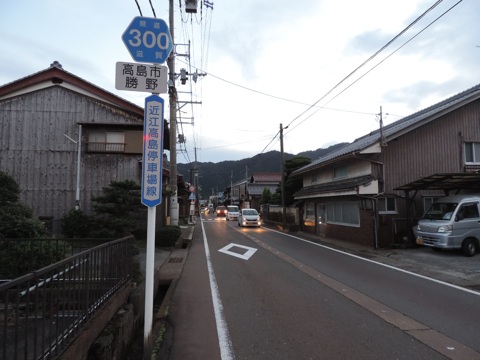 滋賀県道300号近江高島停車場線。高島市勝野にて。2017年撮影